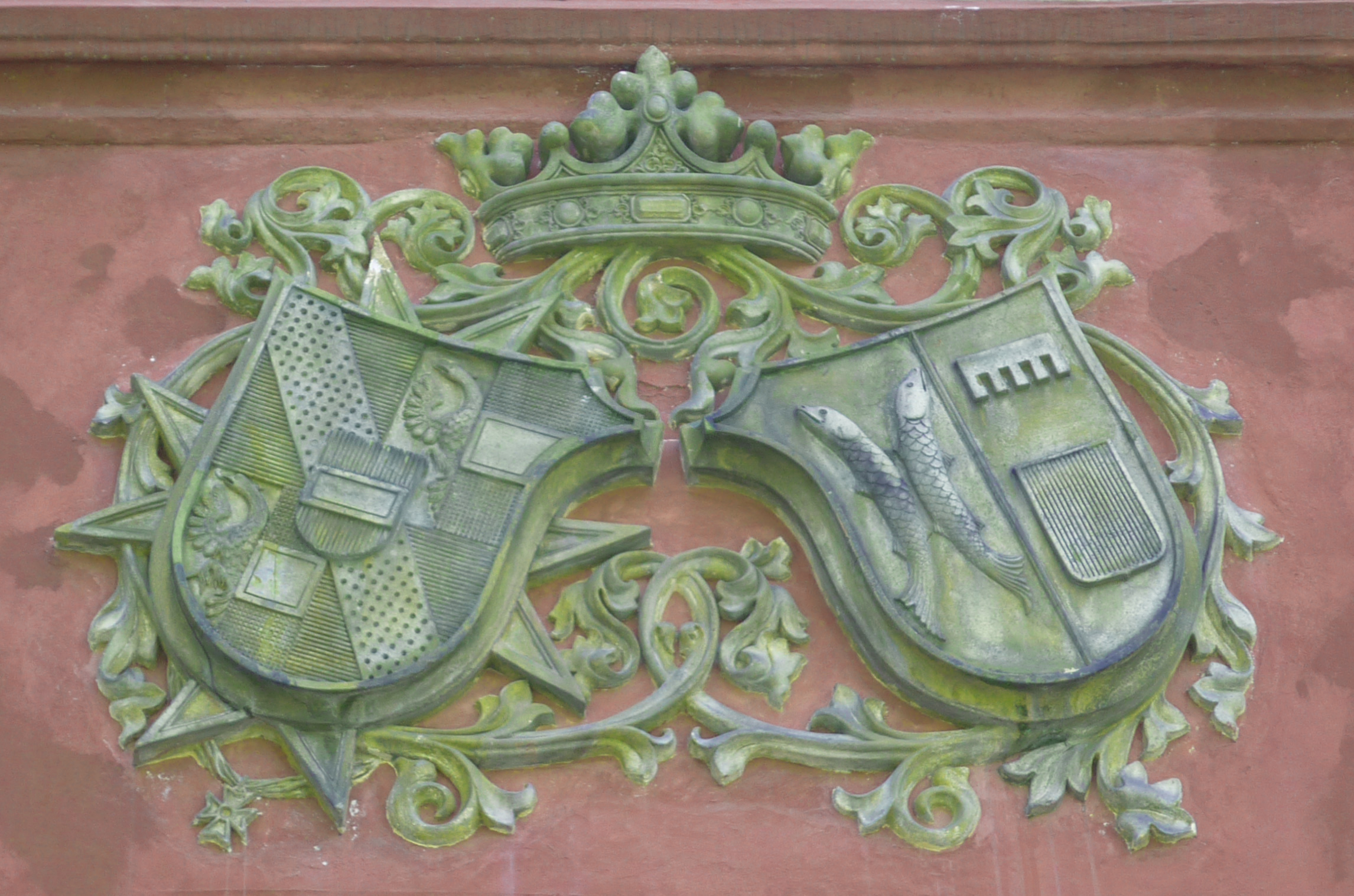 Allianzwappen Thun-Hohenstein und Salm-Reifferscheid am Schloss in Klösterle (Klášterec nad Ohří)